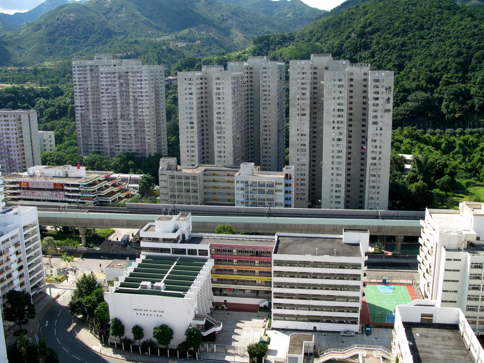 HK Shatin Pok Hong Estate